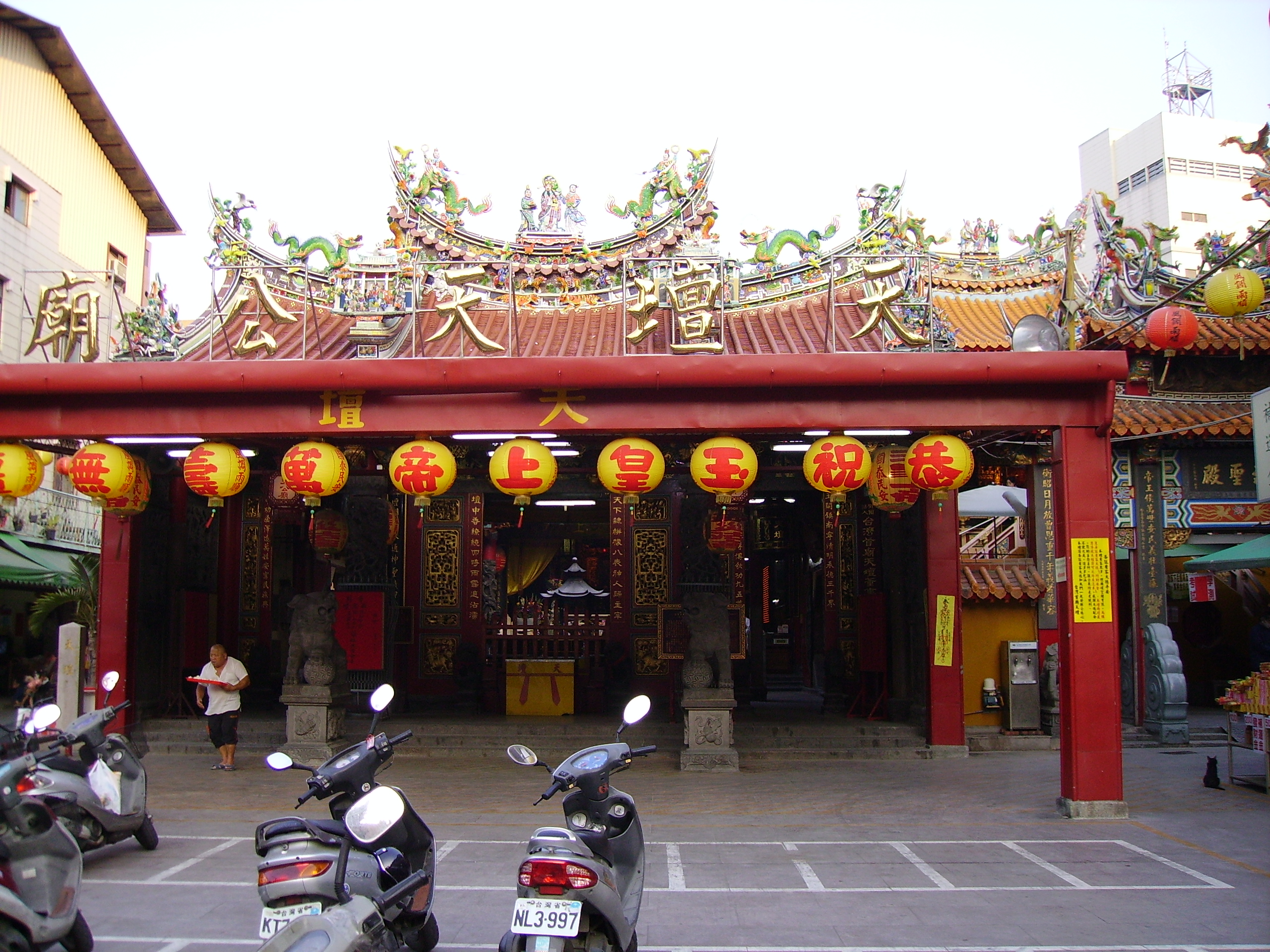 臺南市中西區天壇天公廟。